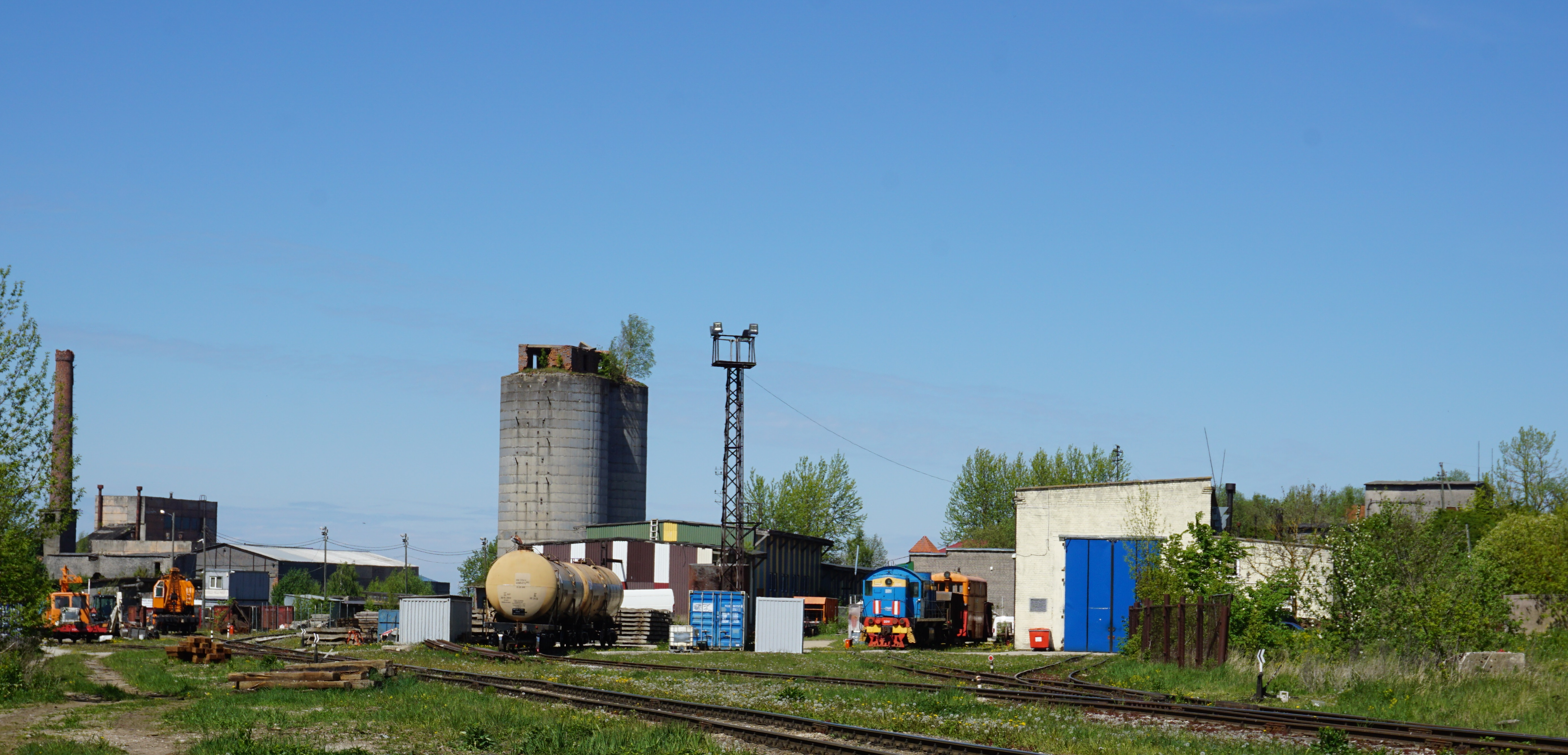 AS Maardu Raudtee territoorium ja veerem.